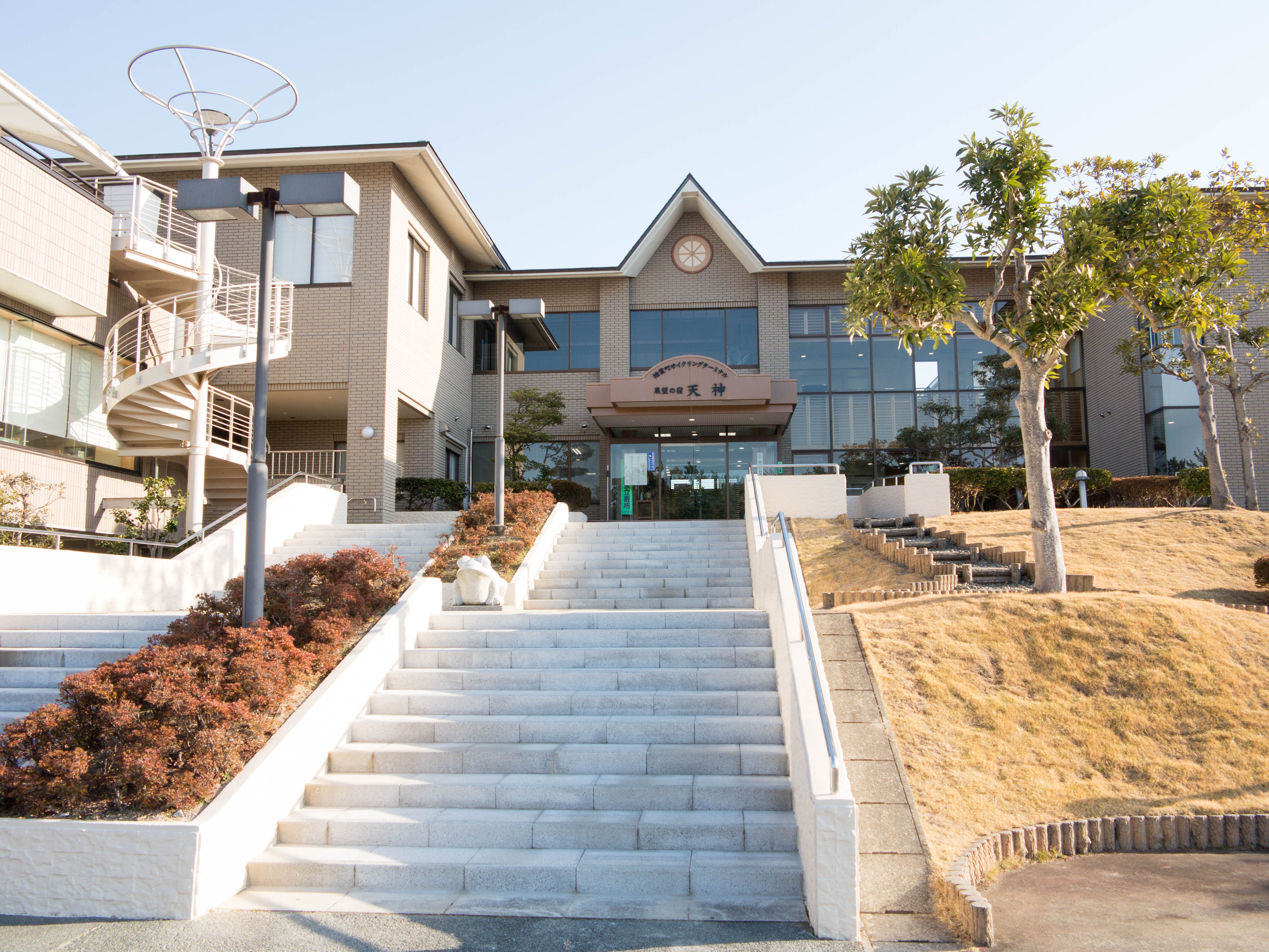 展望の宿 天神